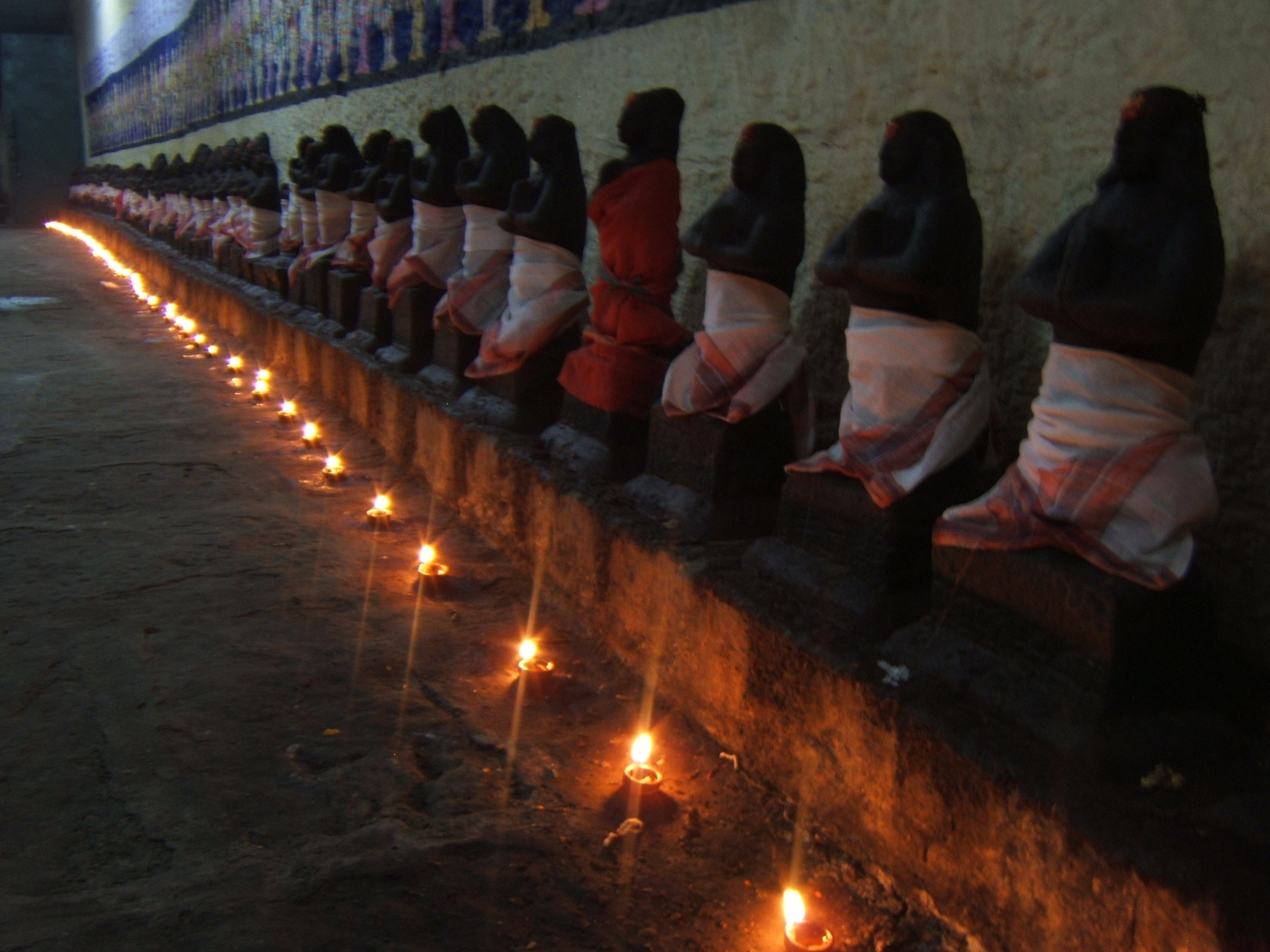 Evening puja at Sri Kokarneshvarar Temple in Tirukokarnam, Tamil Nadu